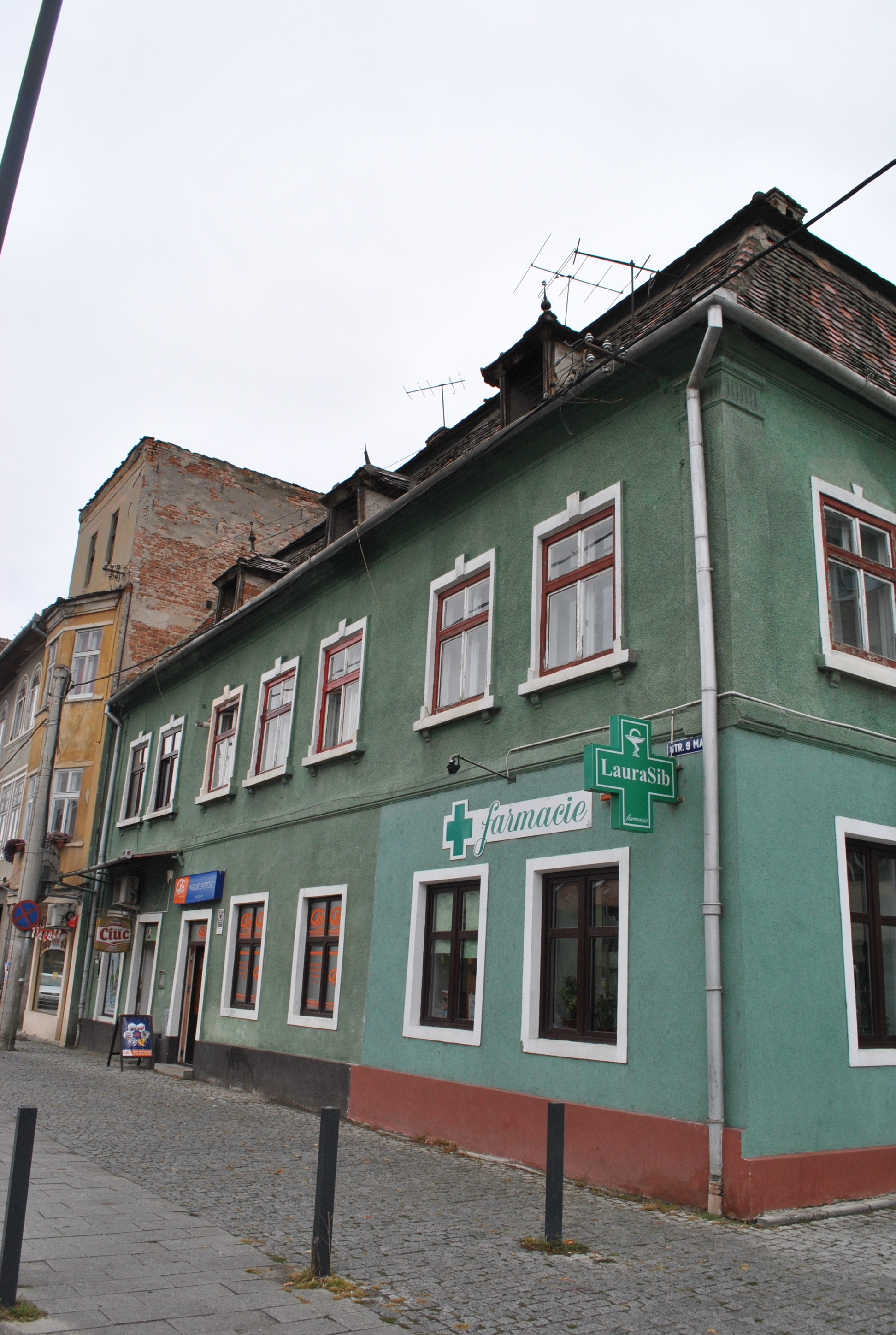 Casă, sec. XVIII